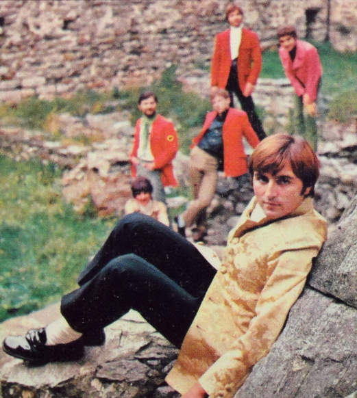 Italian band Giuliano e i Notturni